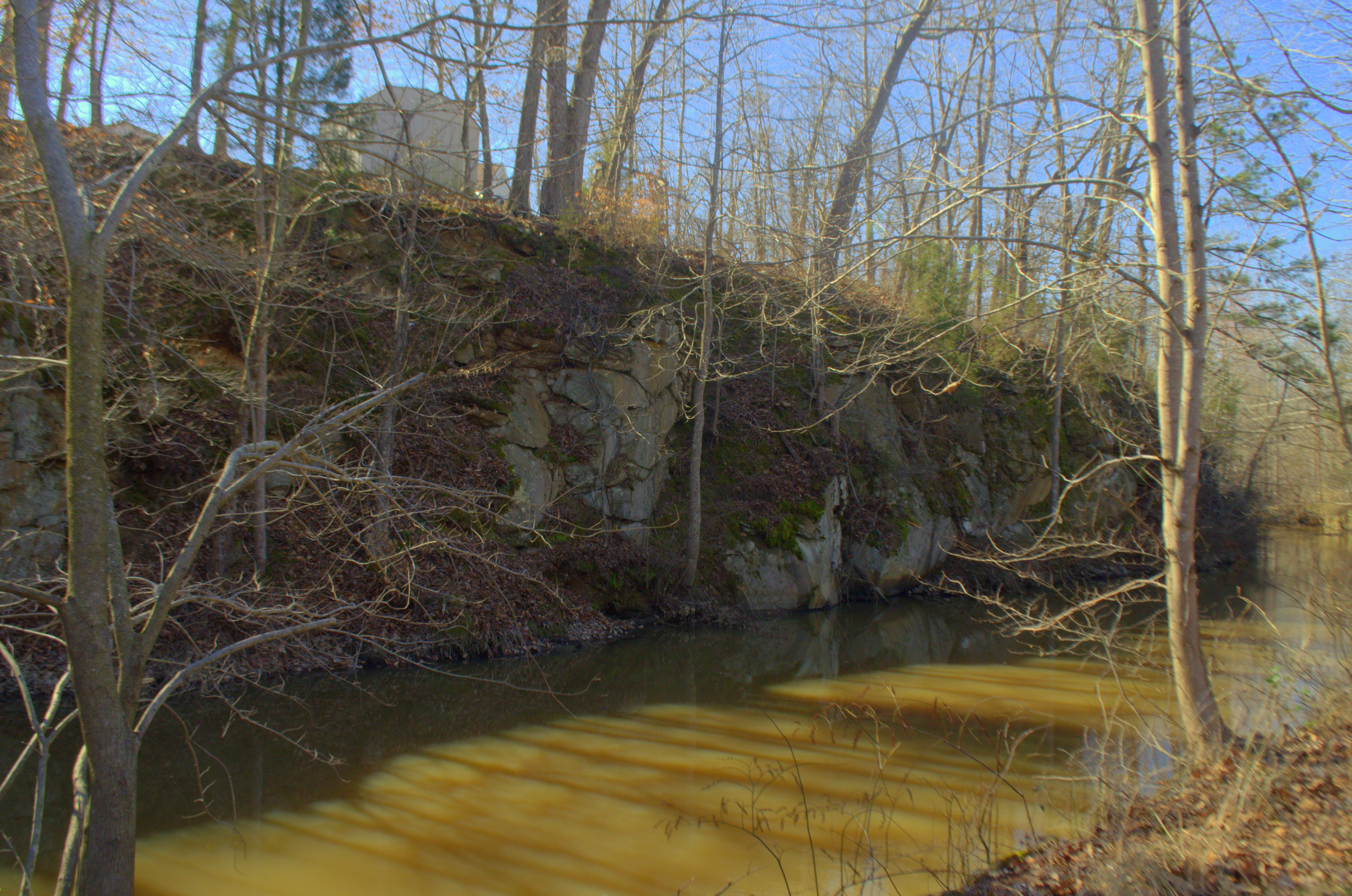 Template:Agnel Borsa Images.